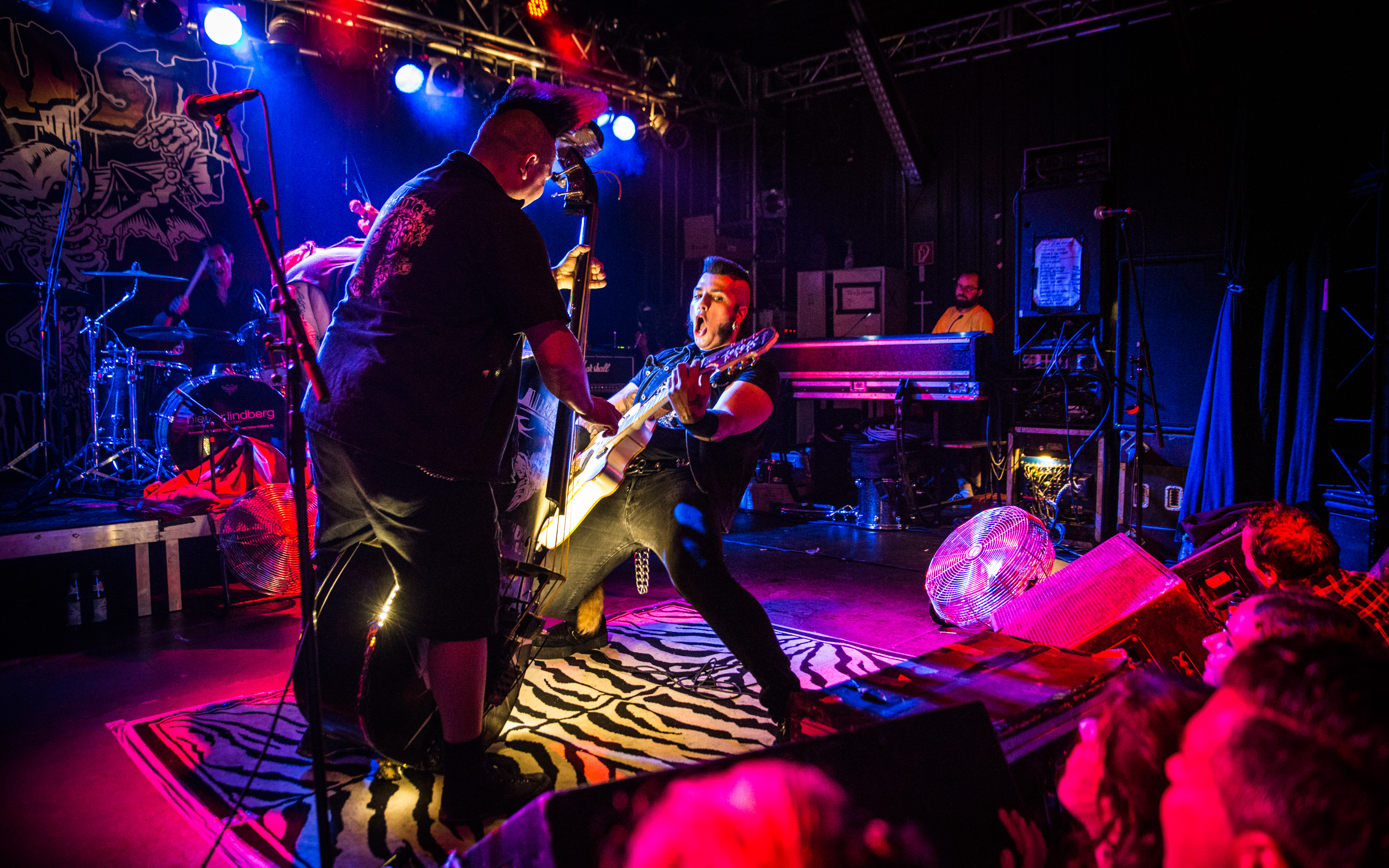 de